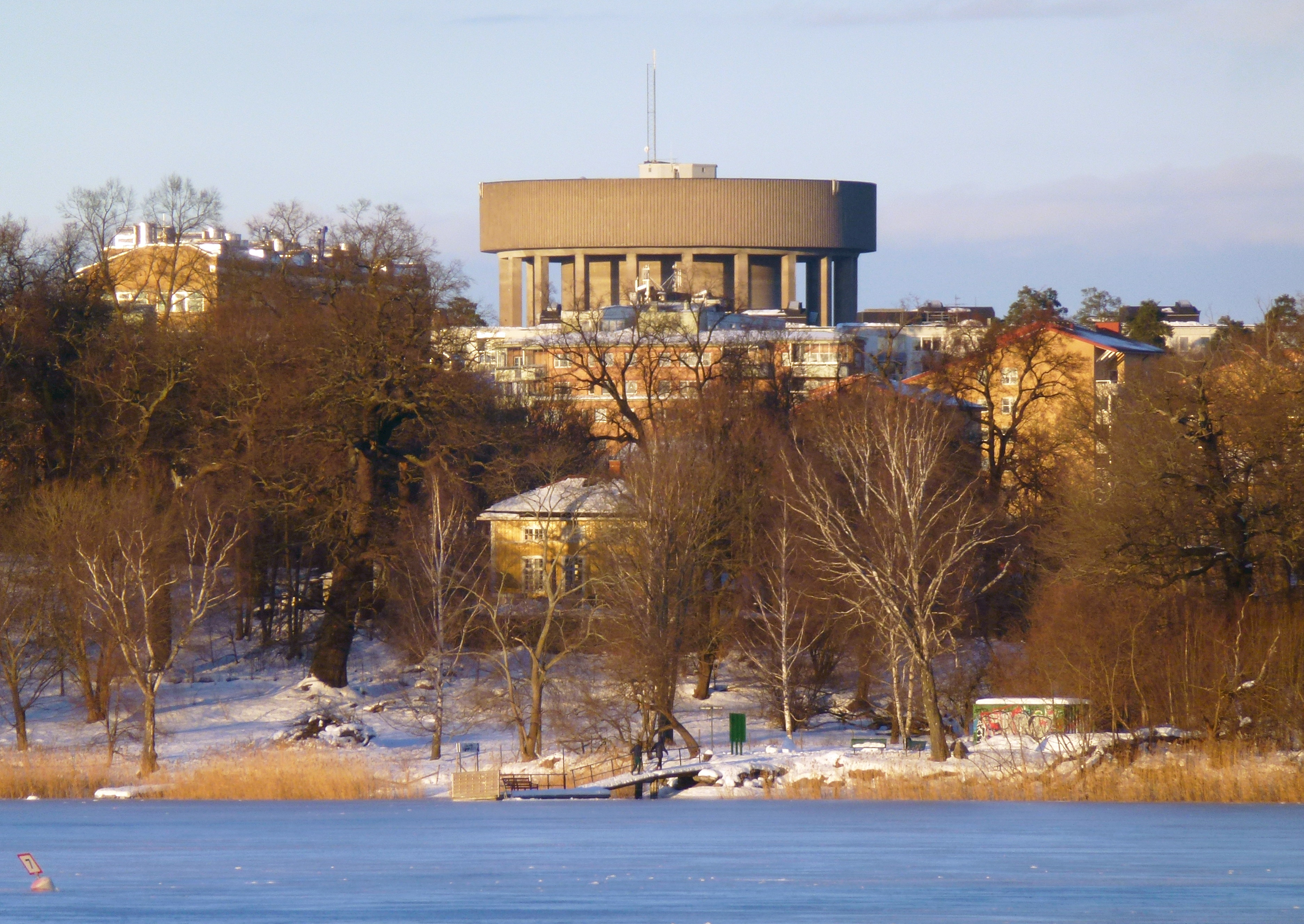 Bergshamra vattentorn, över Brunnsviken